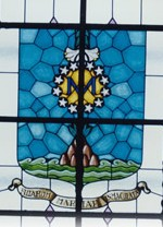 Vidriera de la casa madre de las Religiosas de María Inmaculada-Servicio Doméstico, con el escudo de la congregación